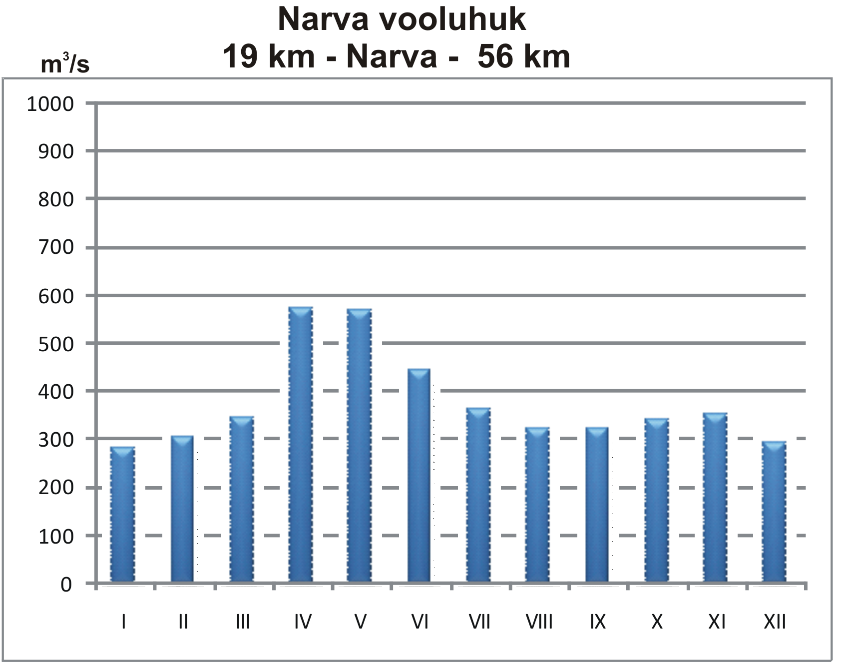 Narva hüdrograaf (Eesti)